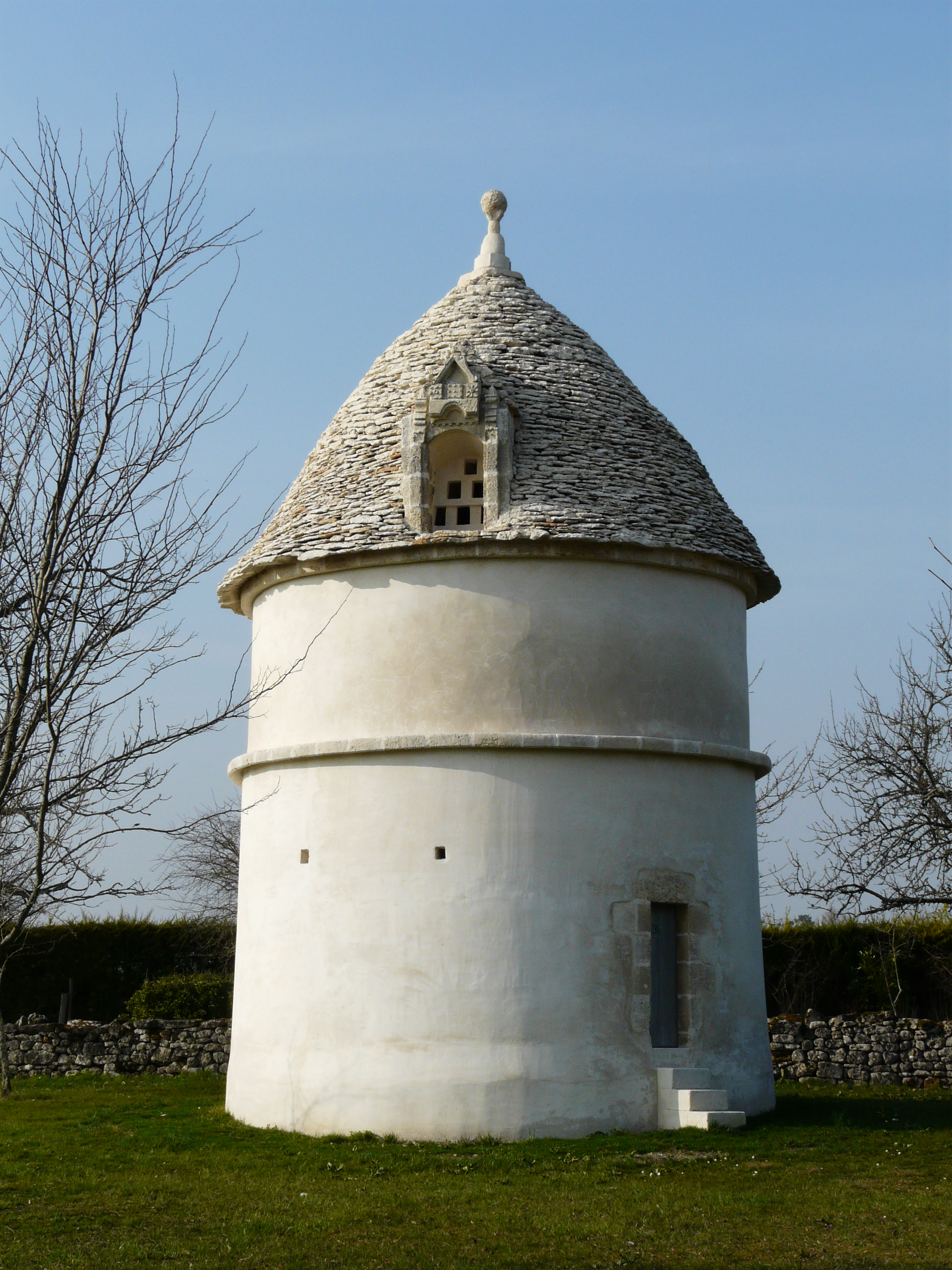 Pigeonnier au sud-ouest du village de Paussac, Paussac-et-Saint-Vivien, Dordogne, France.